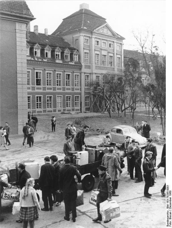 Aufnahmeheim Schloß Barby Zentralbild/Biscan 3.12.1960 Strom der Westzonenflüchtlinge reißt nicht ab Im Aufnahmeheim Barby, Kreis Schönebeck, herrscht Hochbetrieb. Jeden Tag kommen weitere Westzonenflüchtlinge und Rückkehrer und bitten um Aufnahme in der DDR. UBz.: Abreisetag in Barby. Auf dem Hof des ehemaligen Schlosses, das heute Aufnahmeheim ist, herrscht emsiges Leben. Westzonenflüchtlinge, die in der DDR Aufnahme gefunden haben, bringen ihr Gepäck zum Abtransport zum Bahnhof.